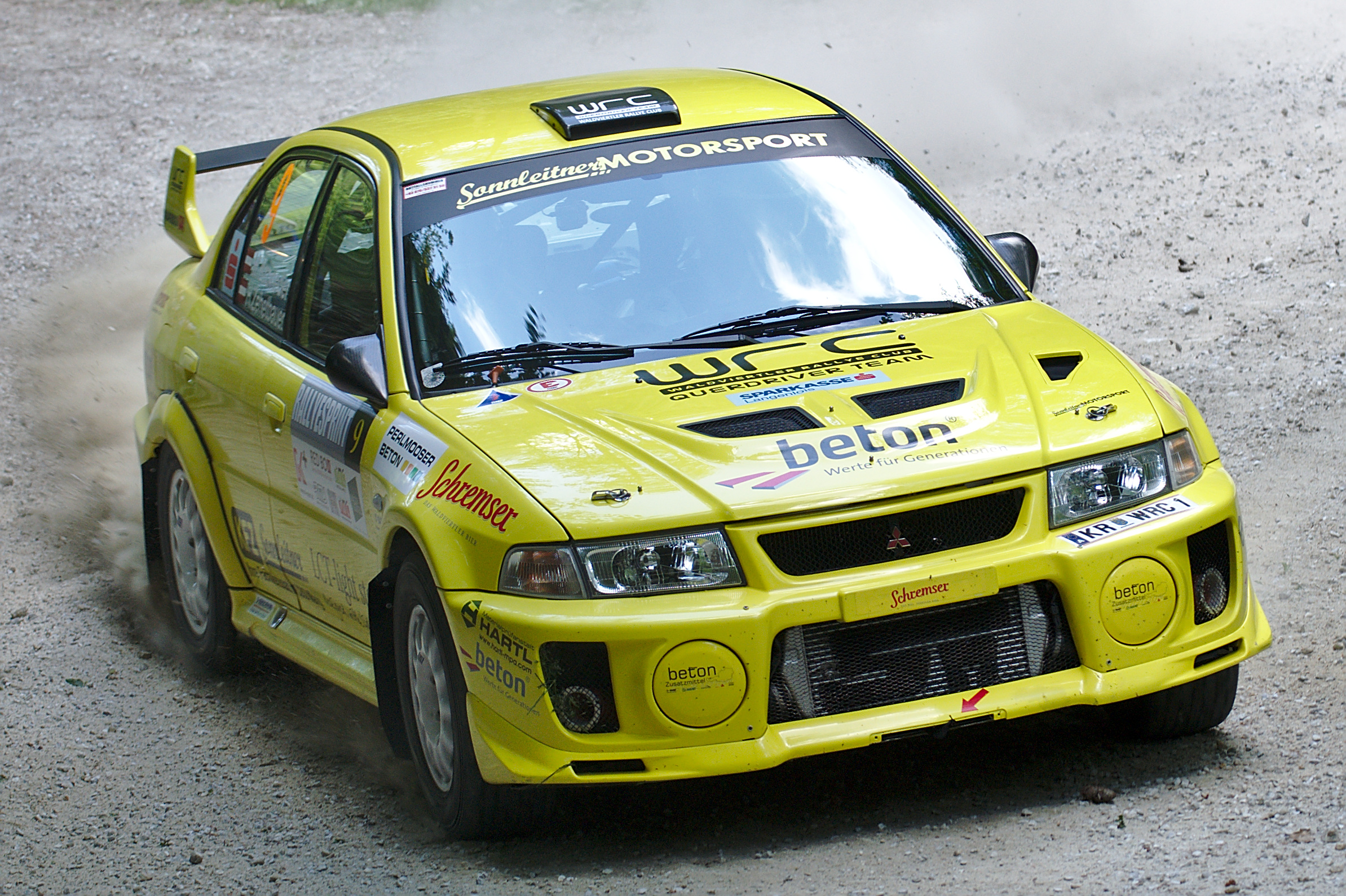 Mitsubishi Lancer Evolution V beim Waldviertel Rallye Sprint 2017